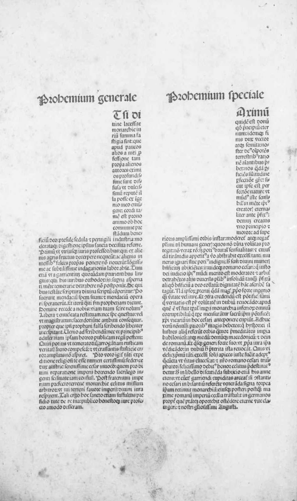 carta a1v